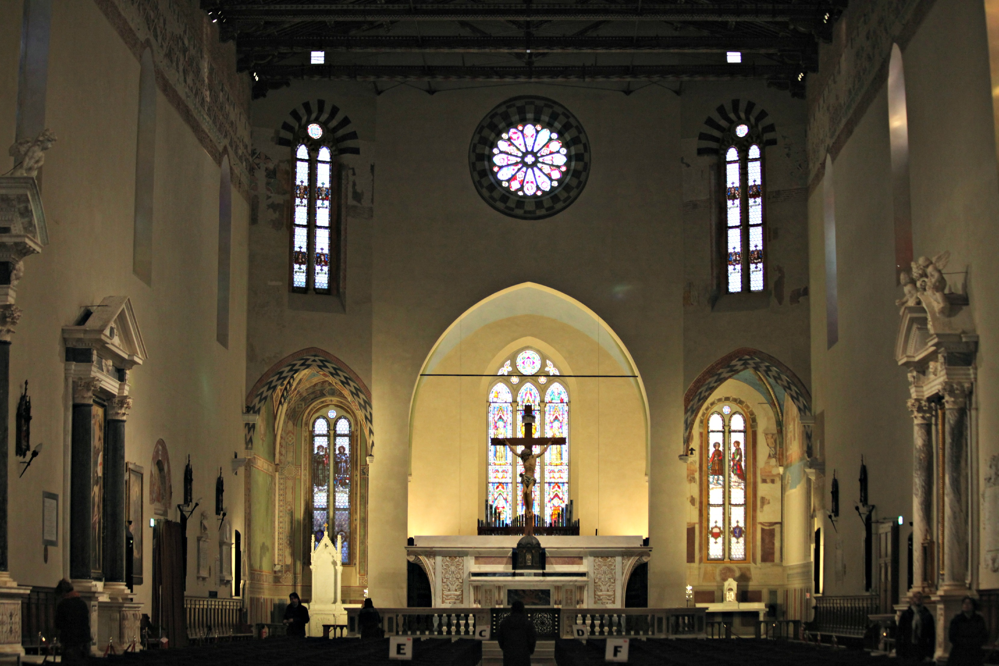 Interno della chiesa di San Francesco, Lucca